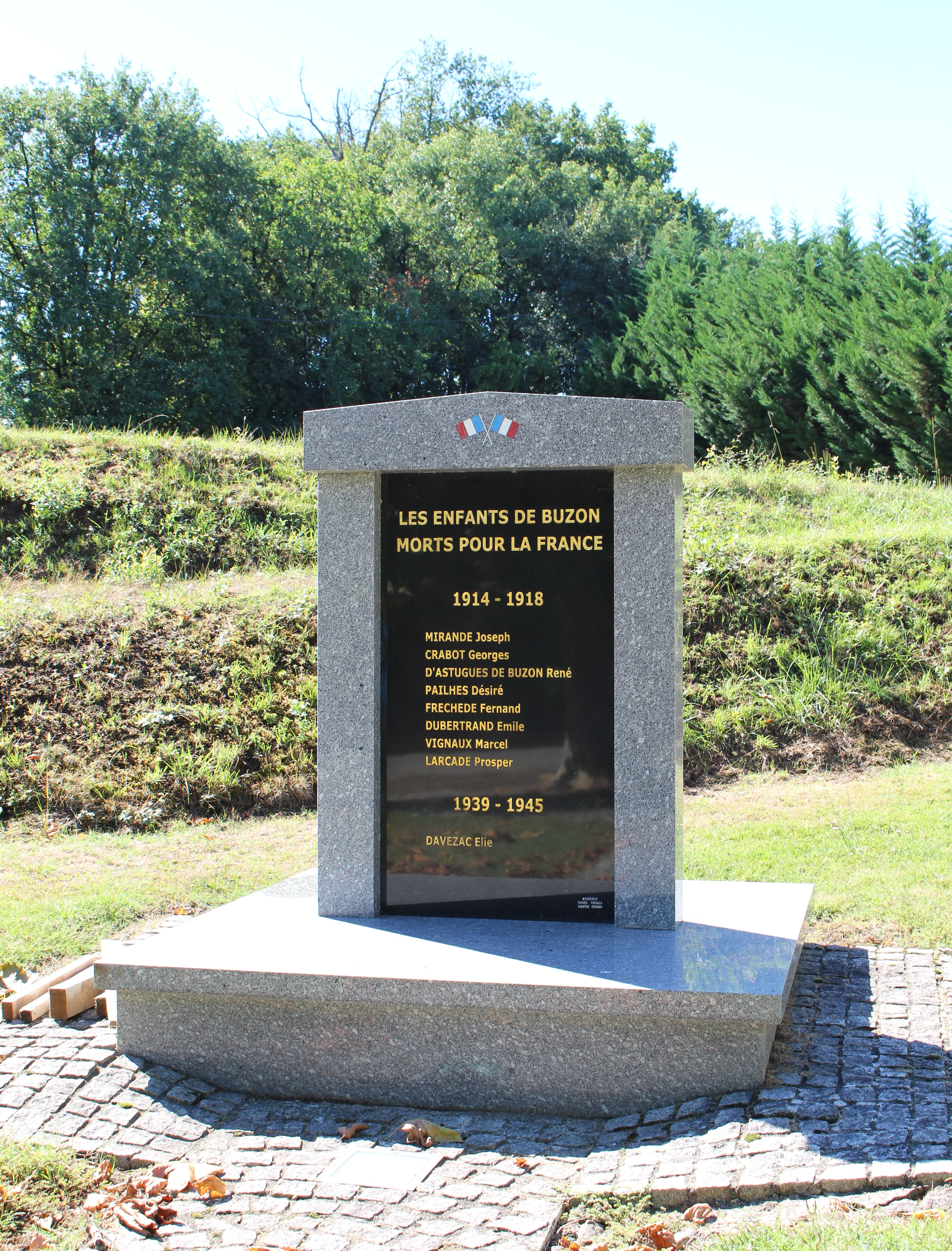 Monument aux morts de Buzon (Hautes-Pyrénées)